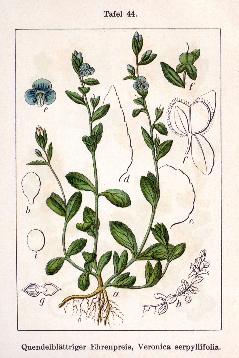 Veronica serpyllifolia L. Original Description Quendelblättriger Ehrenpreis, Veronica serpyllifolia